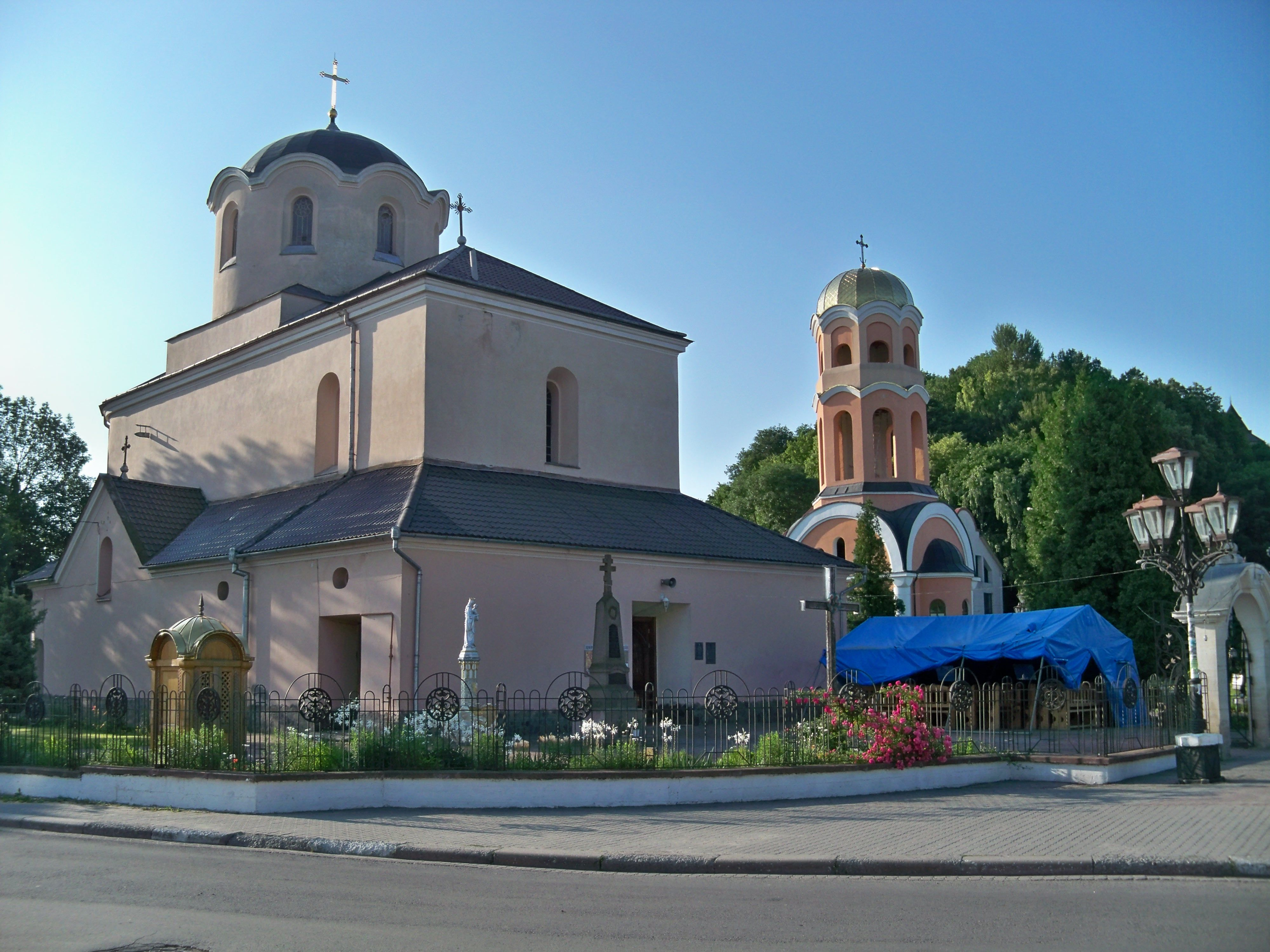 Церква Різдва Христового, Галич, майдан Різдва